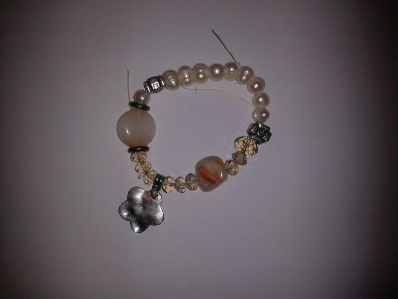 Són braçalets propis per a una entrada en Viquipèdia